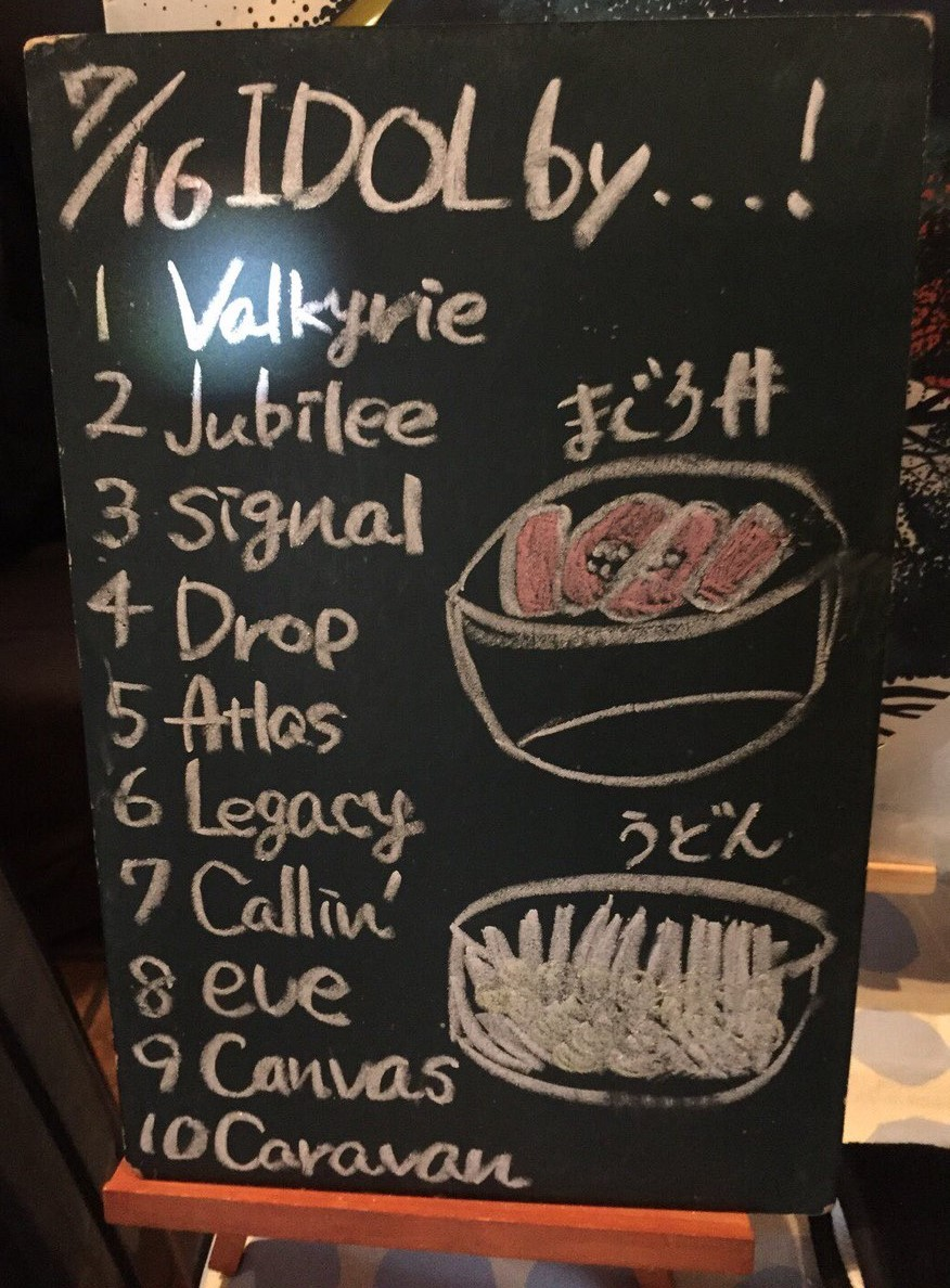 amiinAセトリボード(20180716(2))